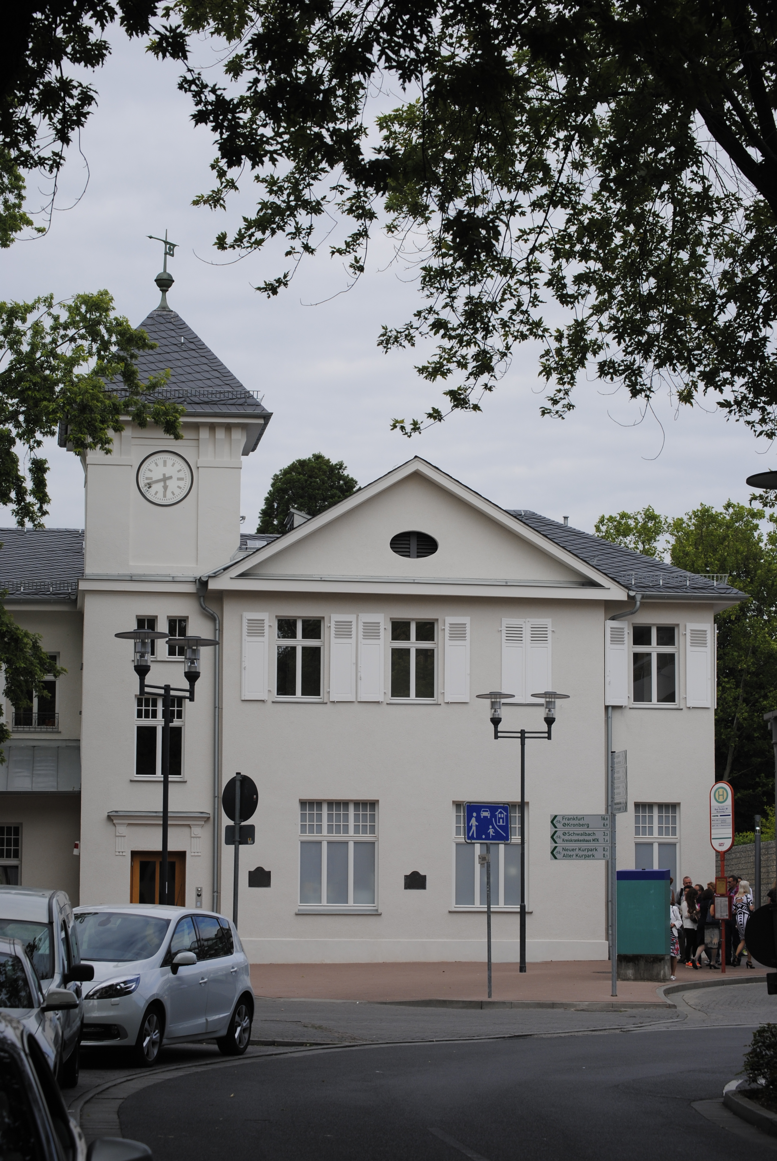 Das alte Bahnhofsgebäude in Bad Soden am Taunus